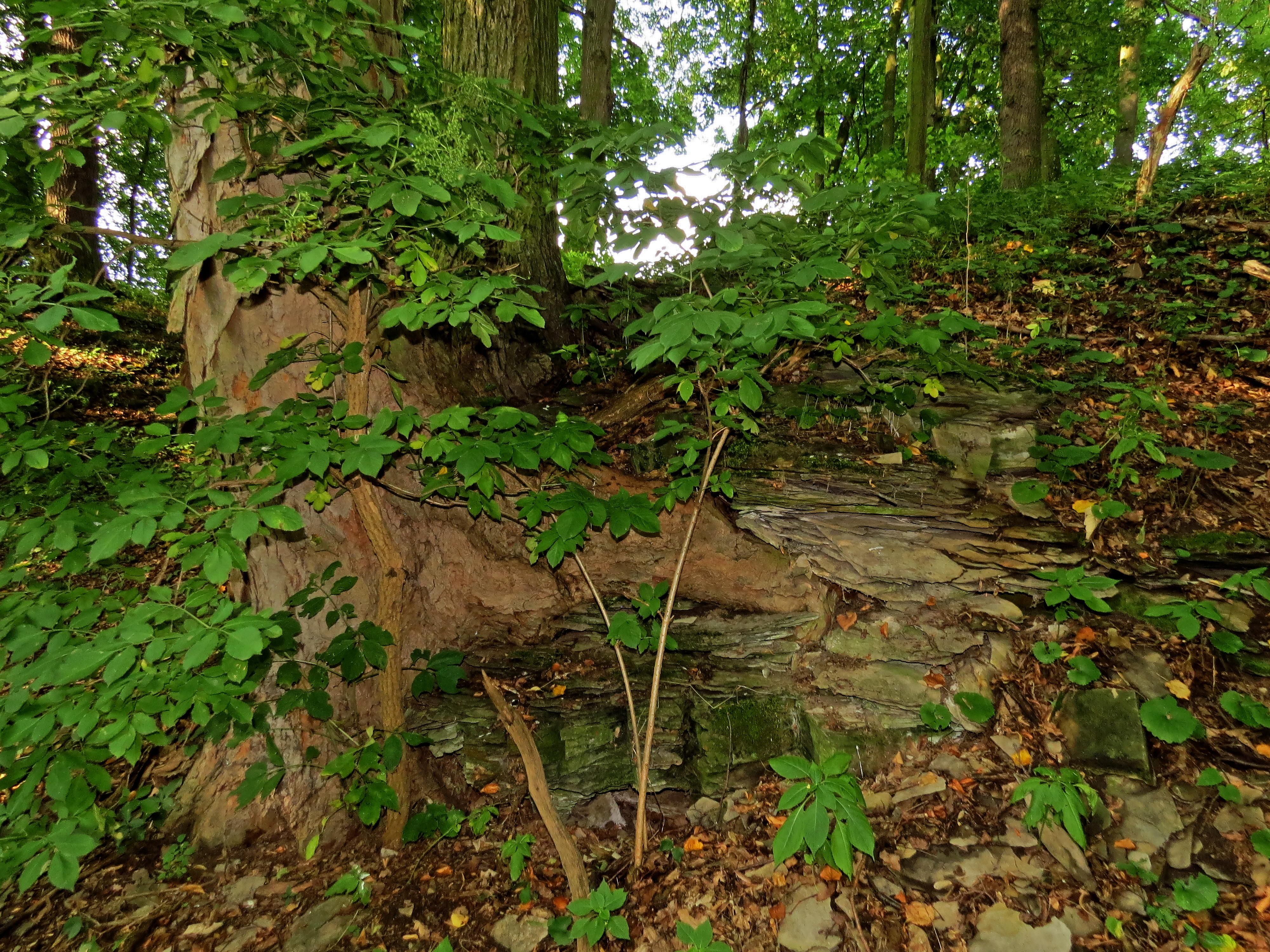 Project: Chráněná území.